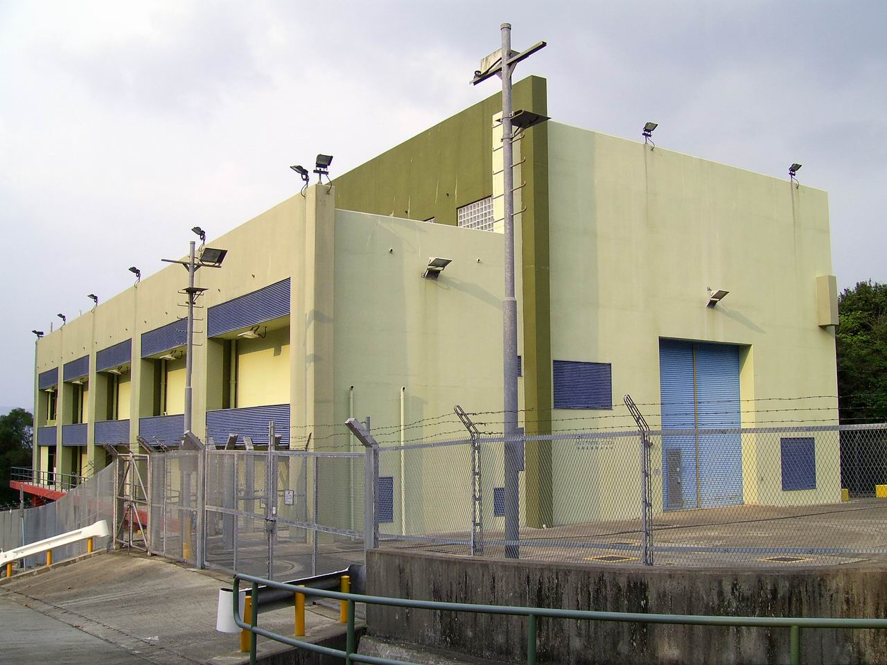 西澳抽水站